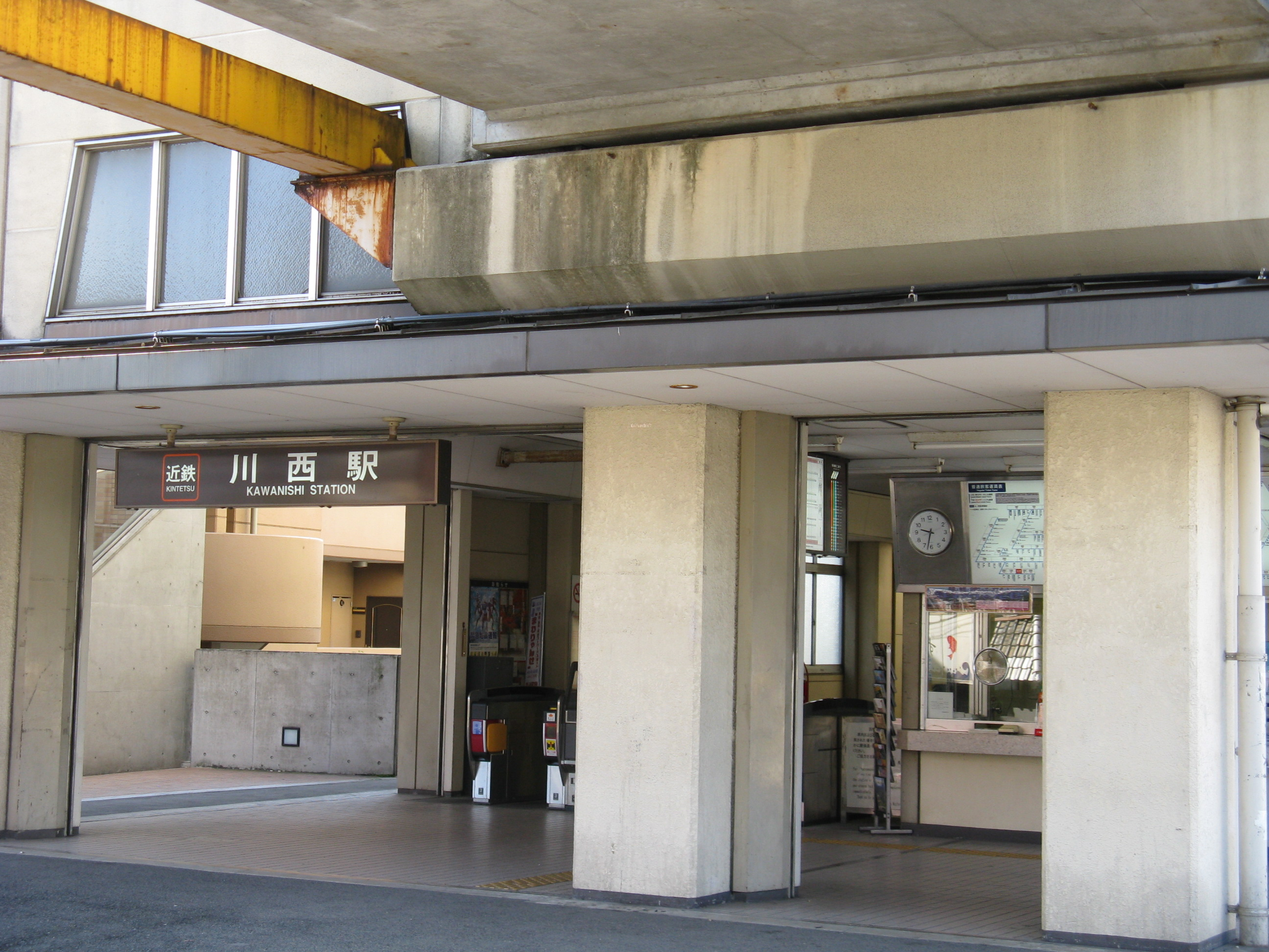 川西駅 (大阪府)